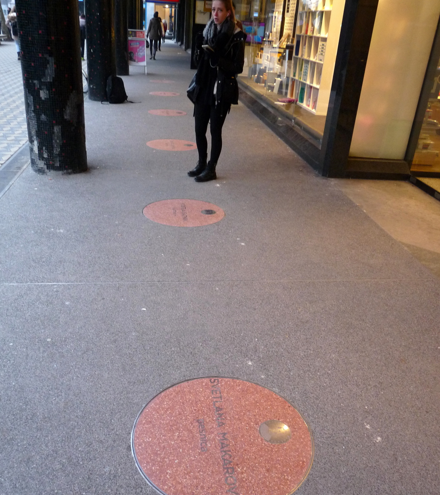 Aleja Levstikov nagrajencev na pločniku pred knjigarno Mladinske knjige na Slovenski cesti v Ljubljani